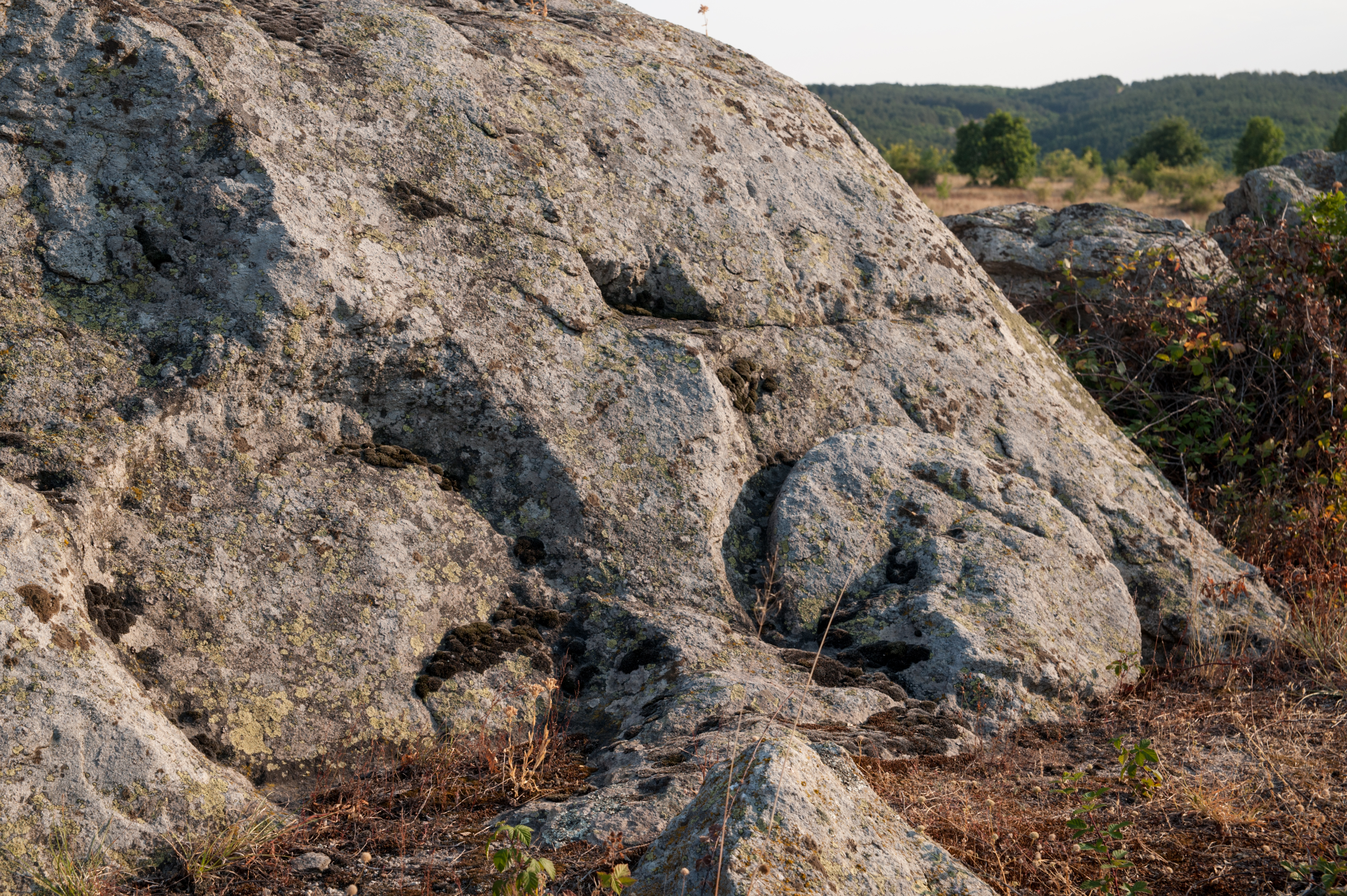 Тракийско светилище Мочукови камъни, м.Дрънчи Дупка, с.Мелница